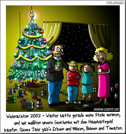 Keine frohen Weihnachten. Cartoon über eine Familie, die kein Geld für Weihnachtsgeschenke hat. Transkription: Weihnachten 2002 – Walter hatte gerade seine Stelle verloren, und wir mußten unsere Geschenke mit dem Haushaltsgeld kaufen. Dieses Jahr gab’s Erbsen und Möhren, Bohnen und Tomaten.